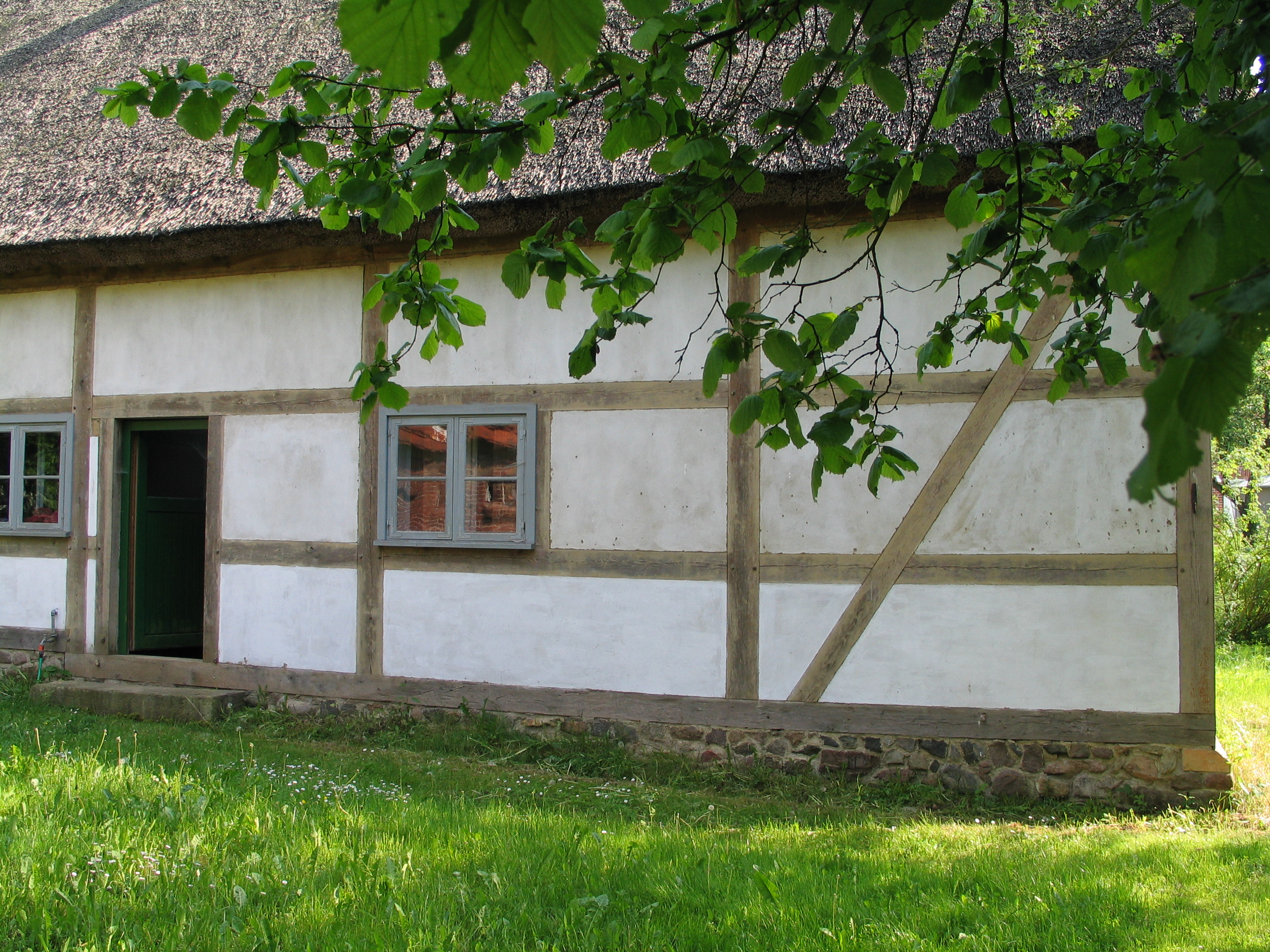 new half-timbered wall infilled with clay / Neue Fachwerkwand mit Lehmausfachung und Sumpfkalk-Anstrich (1 Teil Sumpfkalk, 1/4 Speisequark, 1/8 Leinöl). Die Wand wurde 1997 neu aufgebaut. Der erste Anstrich wurde 1998 aufgebracht. Die unteren Gefache wurden 2004 mit einem neuen Anstrich versehen. Trotz des geringen Dachüberstandes und der fehlenden Regenrinne widersteht die Lehmausfachung gut der Witterung.